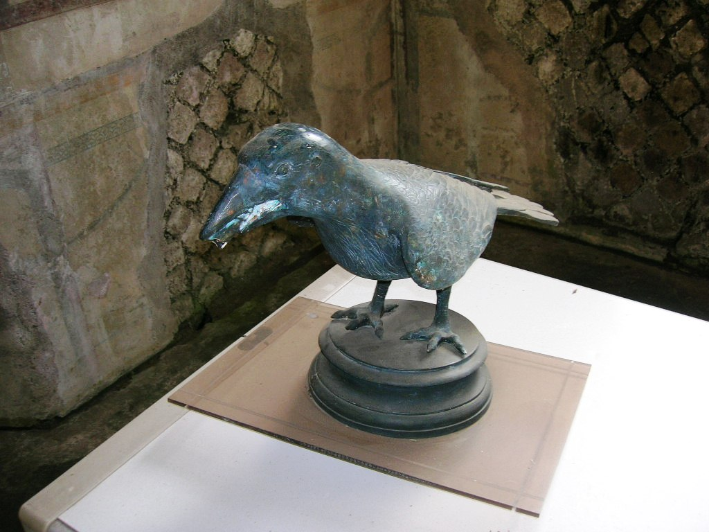 Copia di un corvo in bronzo utilizzato per la fontana